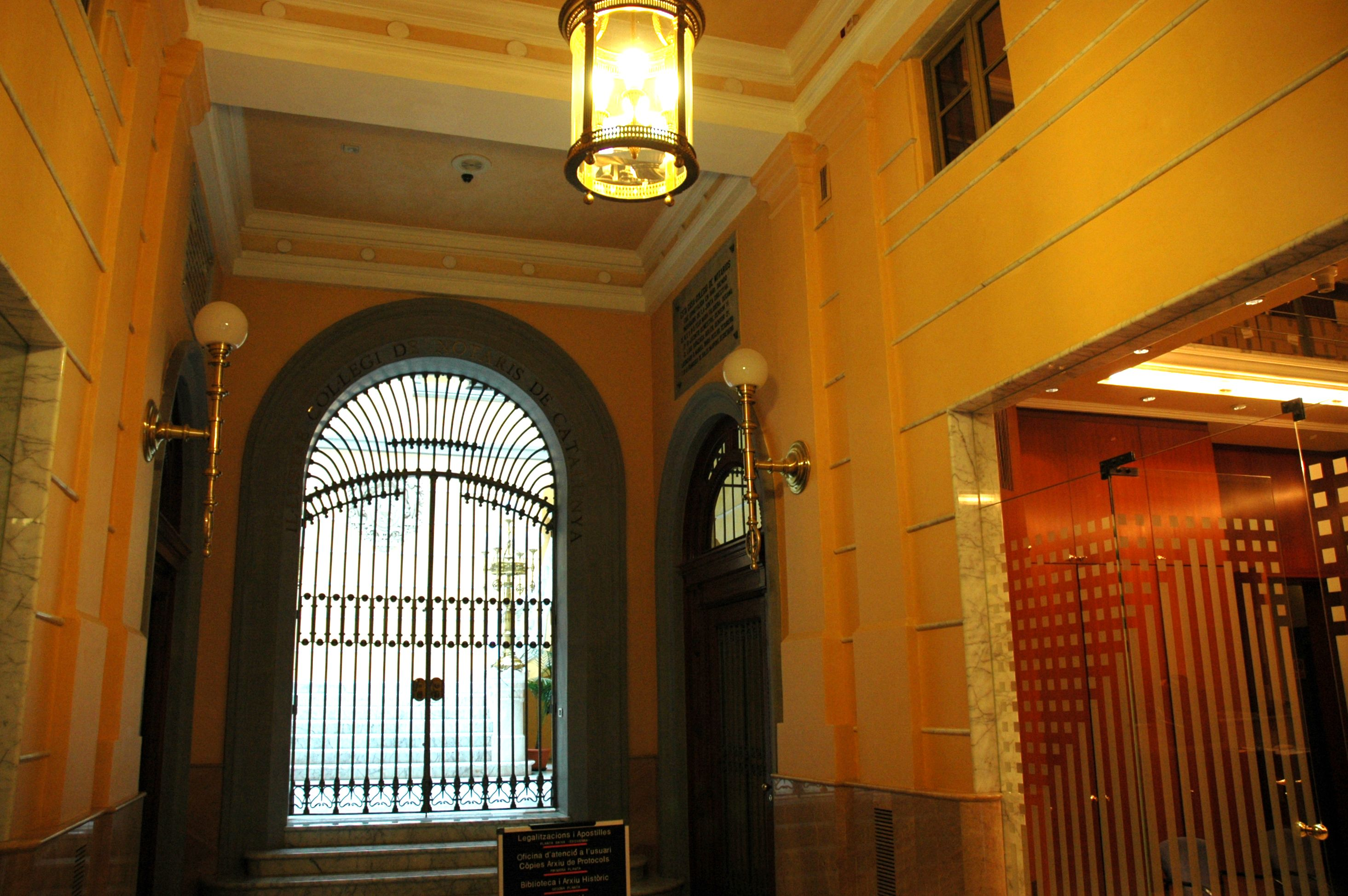 Col·legi de Notaris de Catalunya - Vestíbol